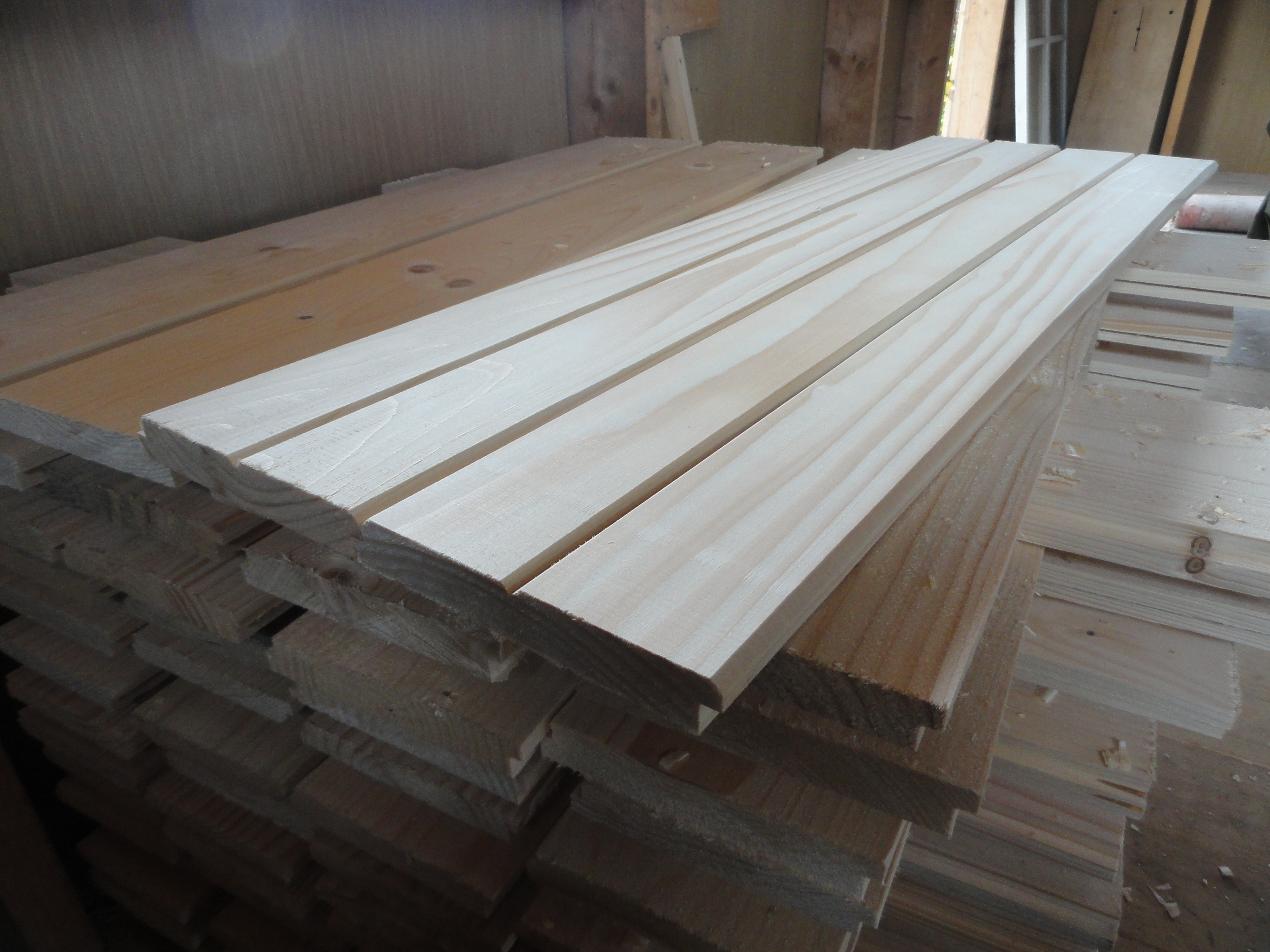 Вагонка в стопке